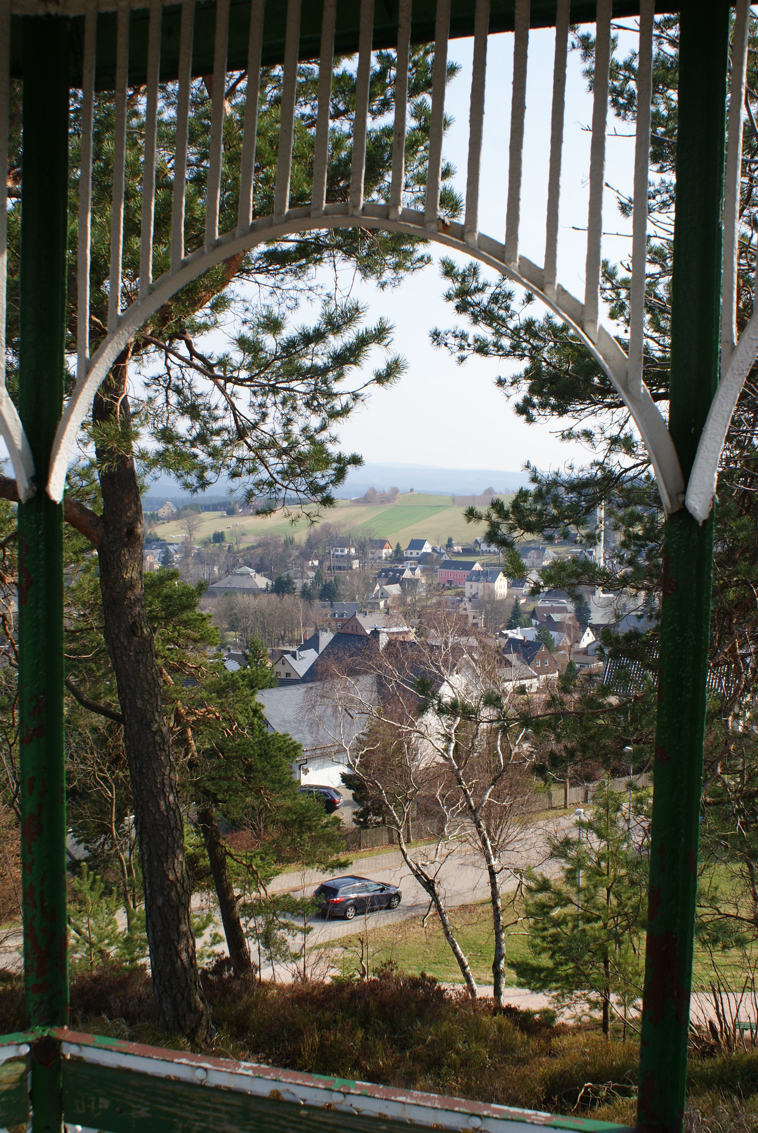 Der Pavillon auf dem Fuchsstein wurde aus dem Garten des ehemaligen Schönheider Arztes Dr. Wolf an seinen jetzigen Standort transportiert. Von hier hat man eine schöne Aussicht auf Schönheide, insbesondere auf den Ortsteil Baumannsberg.